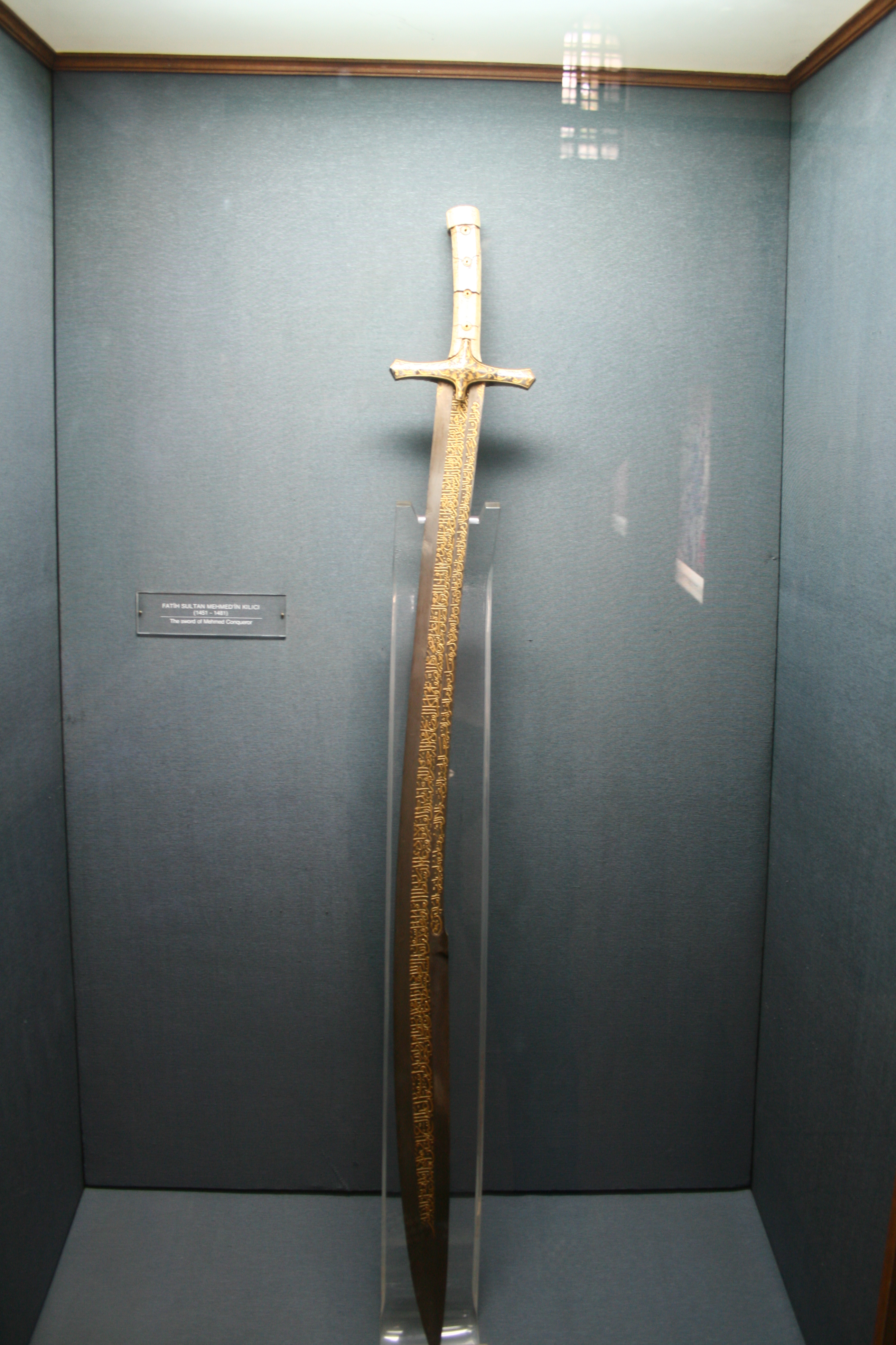 Schwert des osmanischen Sultans Fatih Sultan Mehmet Han